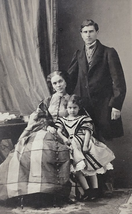 Княгиня Трубецкая, Елизавета Эсперовна, урождённая Белосельская-Белозельская, с мужем Петром Никитичем (1826–1880) и ребёнком Еленой (1852–1917).